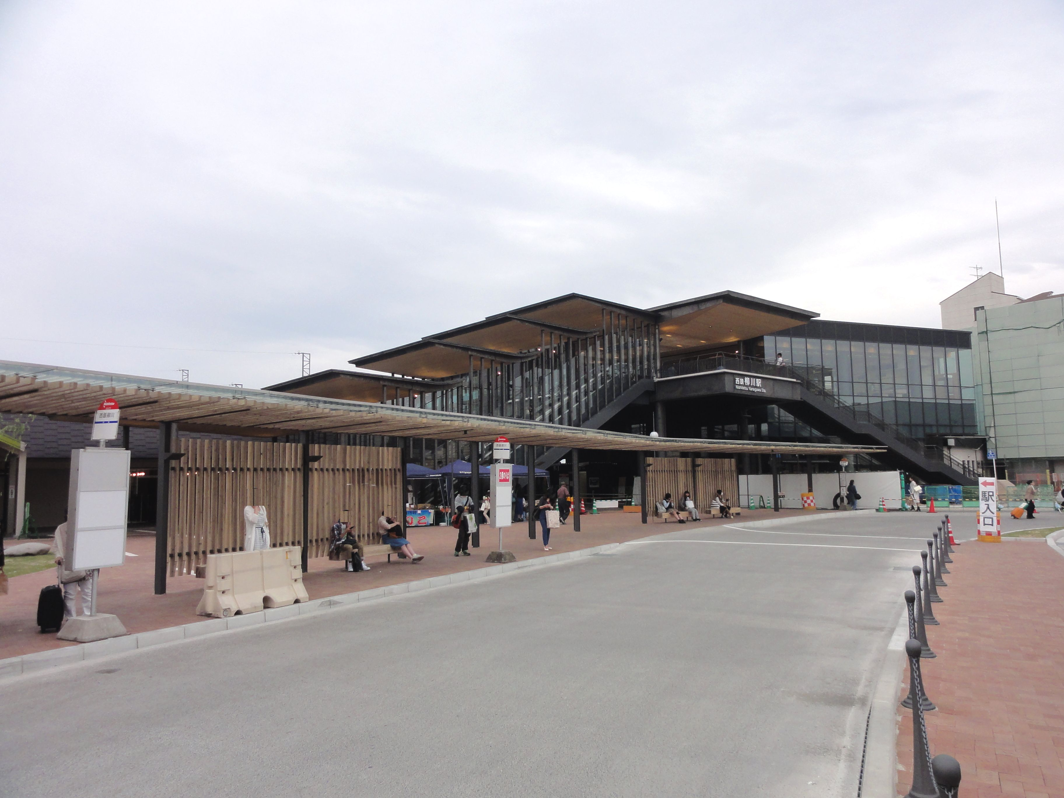 西鉄柳川駅